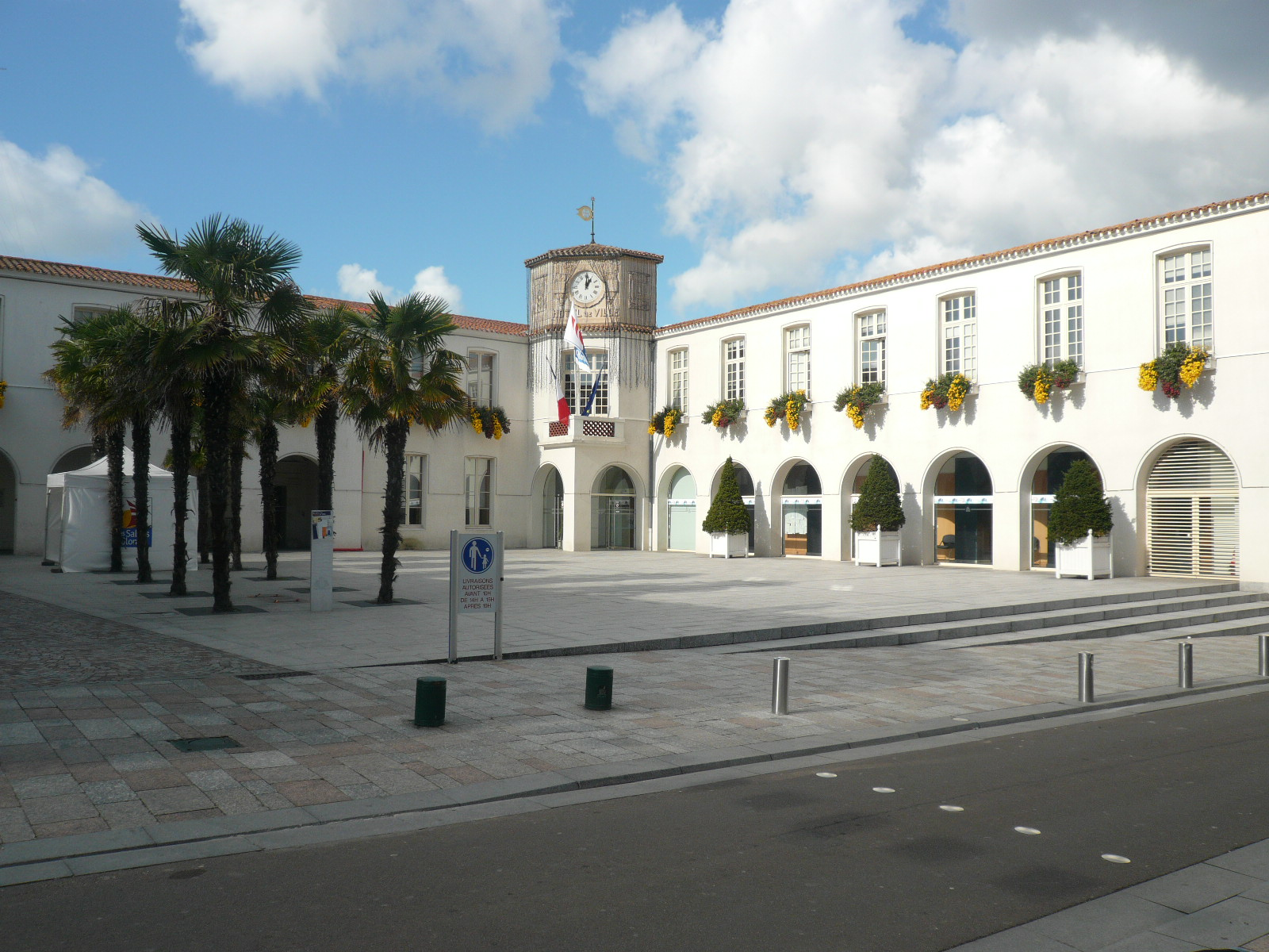 Mairie des Sables-d'Olonne